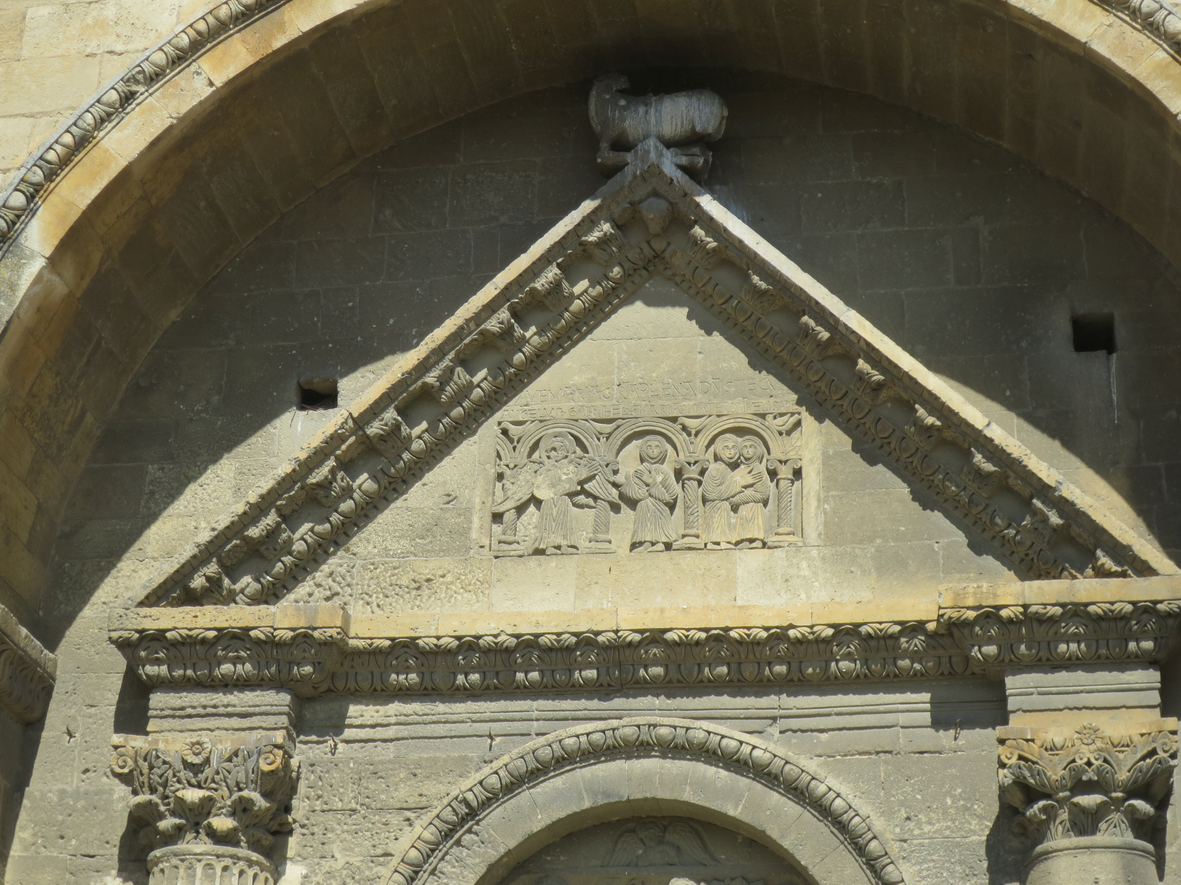 Detail aus der Fassade von Saint-Gabriel Tarascon